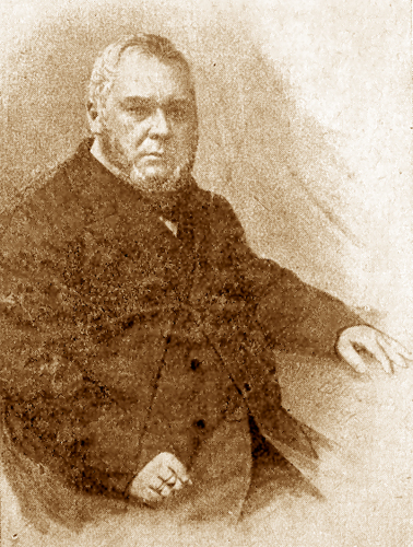 Aleksander Wielopolski (foto)